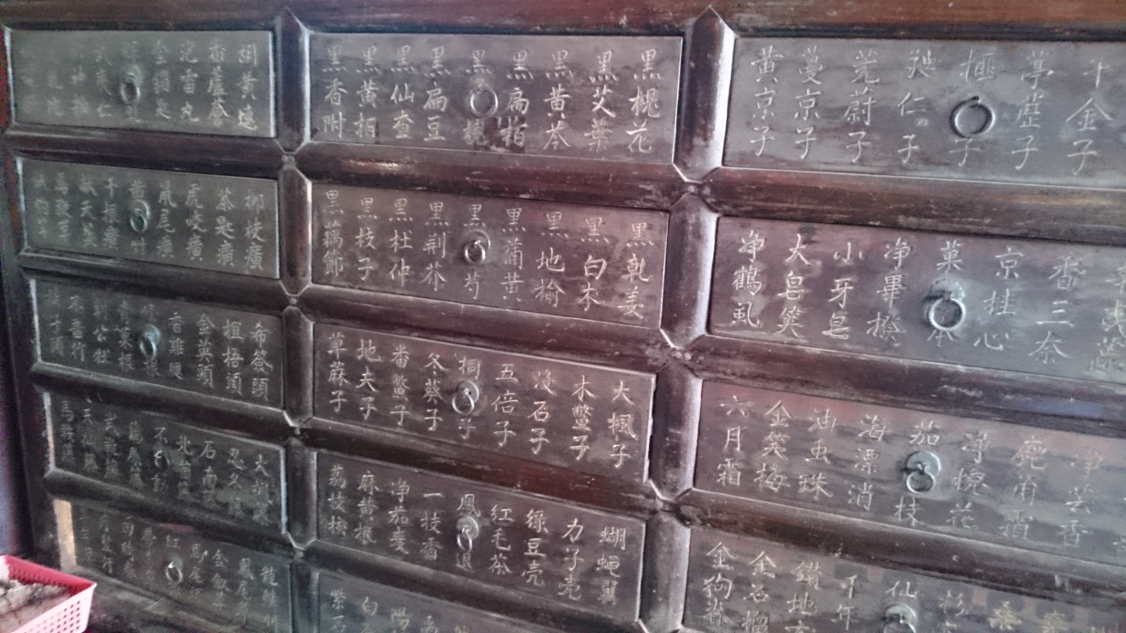 「益安堂」漢藥店裡所存放著由第一代翁玉潭先生在一個世紀前從中國大陸運來的手工刻字藥櫃。